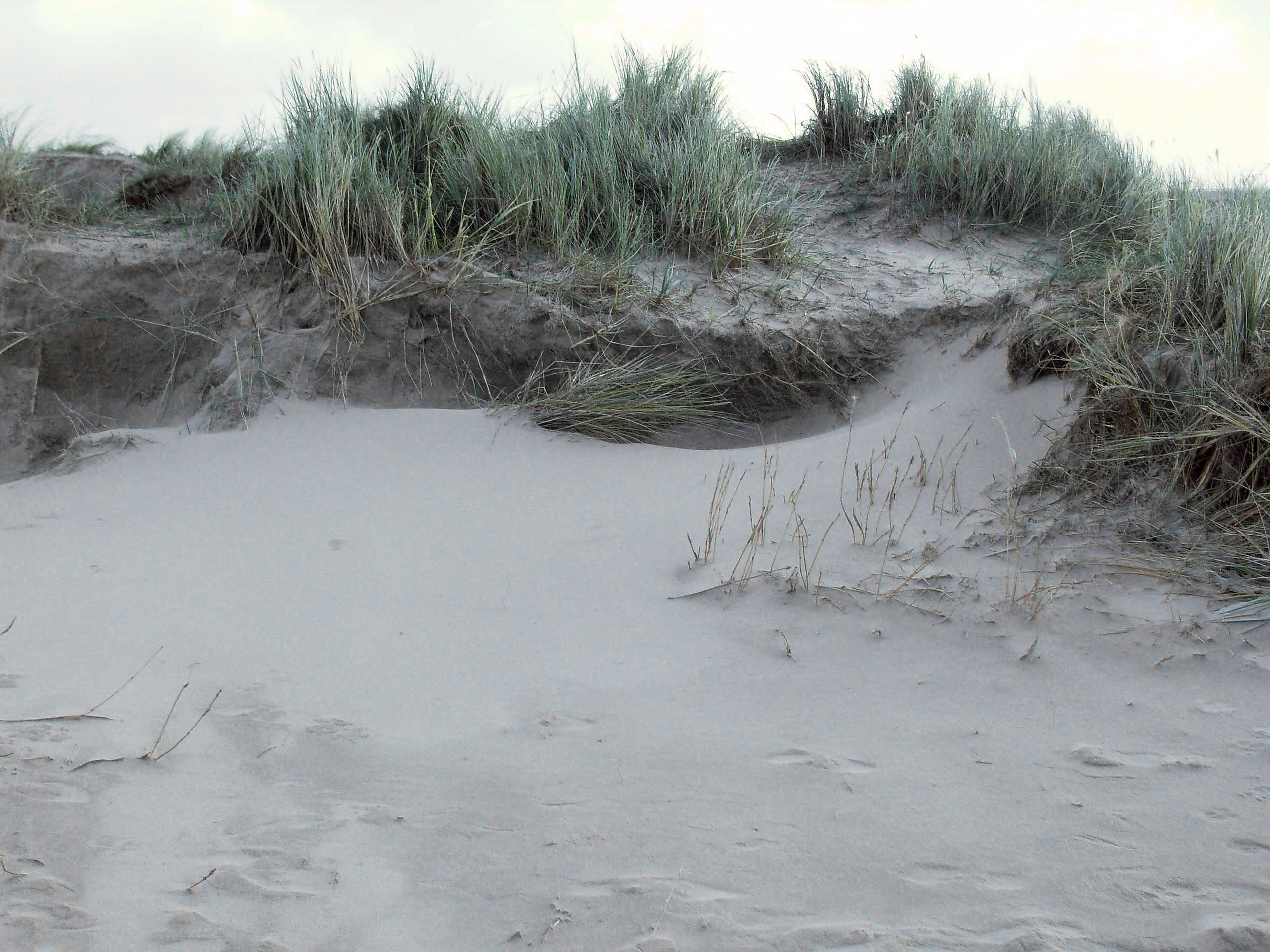 Ammophila arenaria; LK Friesland, Niedersachsen